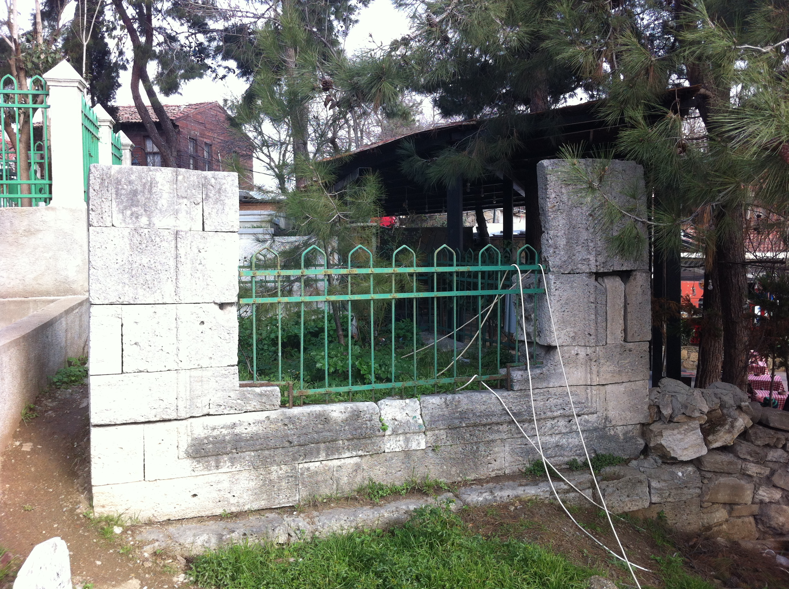 Alaeddin Çelebi Türbesi-Eyüp